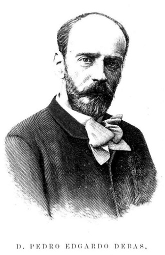 Pedro Edgardo Debas (1845-1891), distinguido fotógrafo.